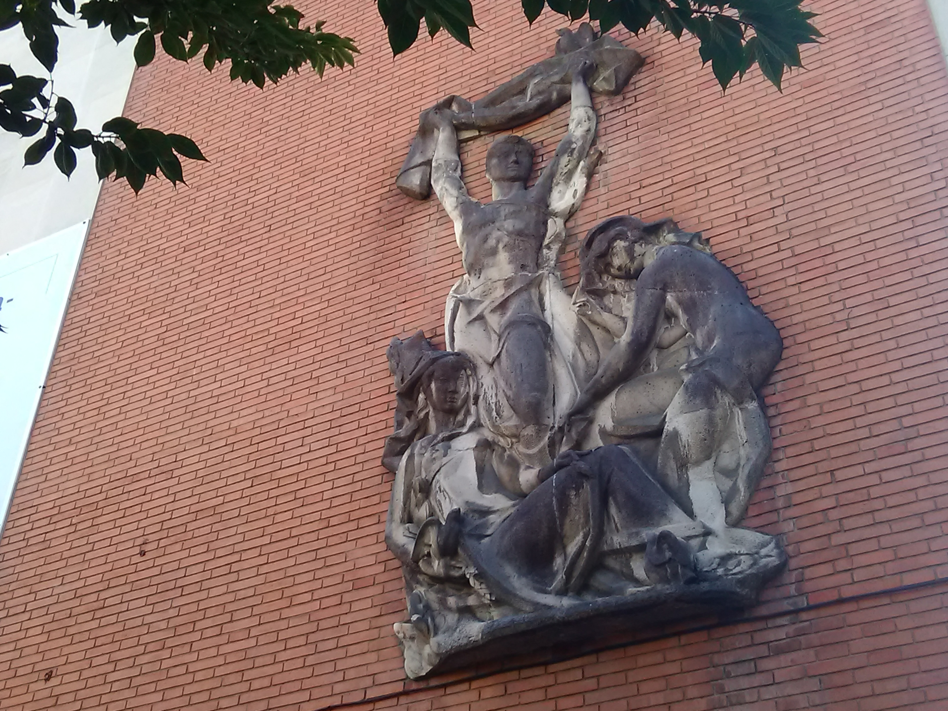 Antonio Martinez Penella eskultore valentziarrak eliza eta eraikin publiko asko apaindu zituen frankismo garaian.